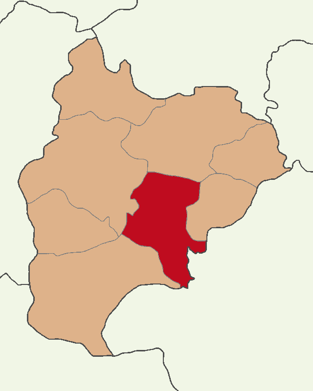 Söğüt ilçesinin konumu